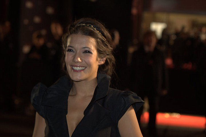 Mélanie Doutey à la cérémonie des César du cinéma